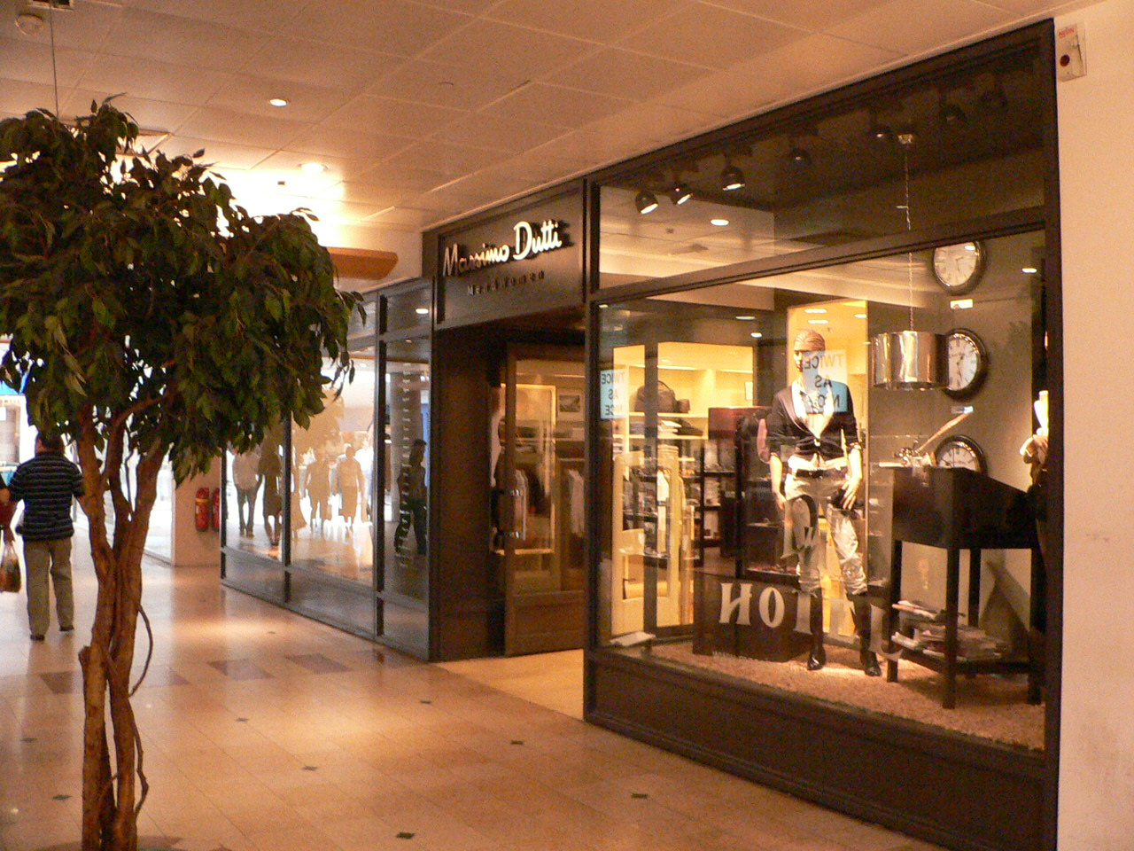 Moi E Poulsen, cède tous mes droits à la Fondation Wikimedia et Wikipedia. Utilisation entièrement libre.